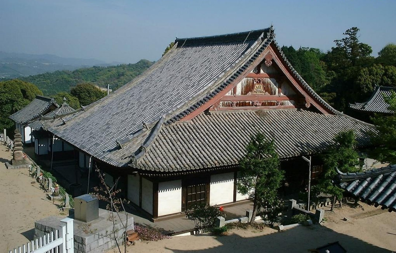 太山寺の本堂